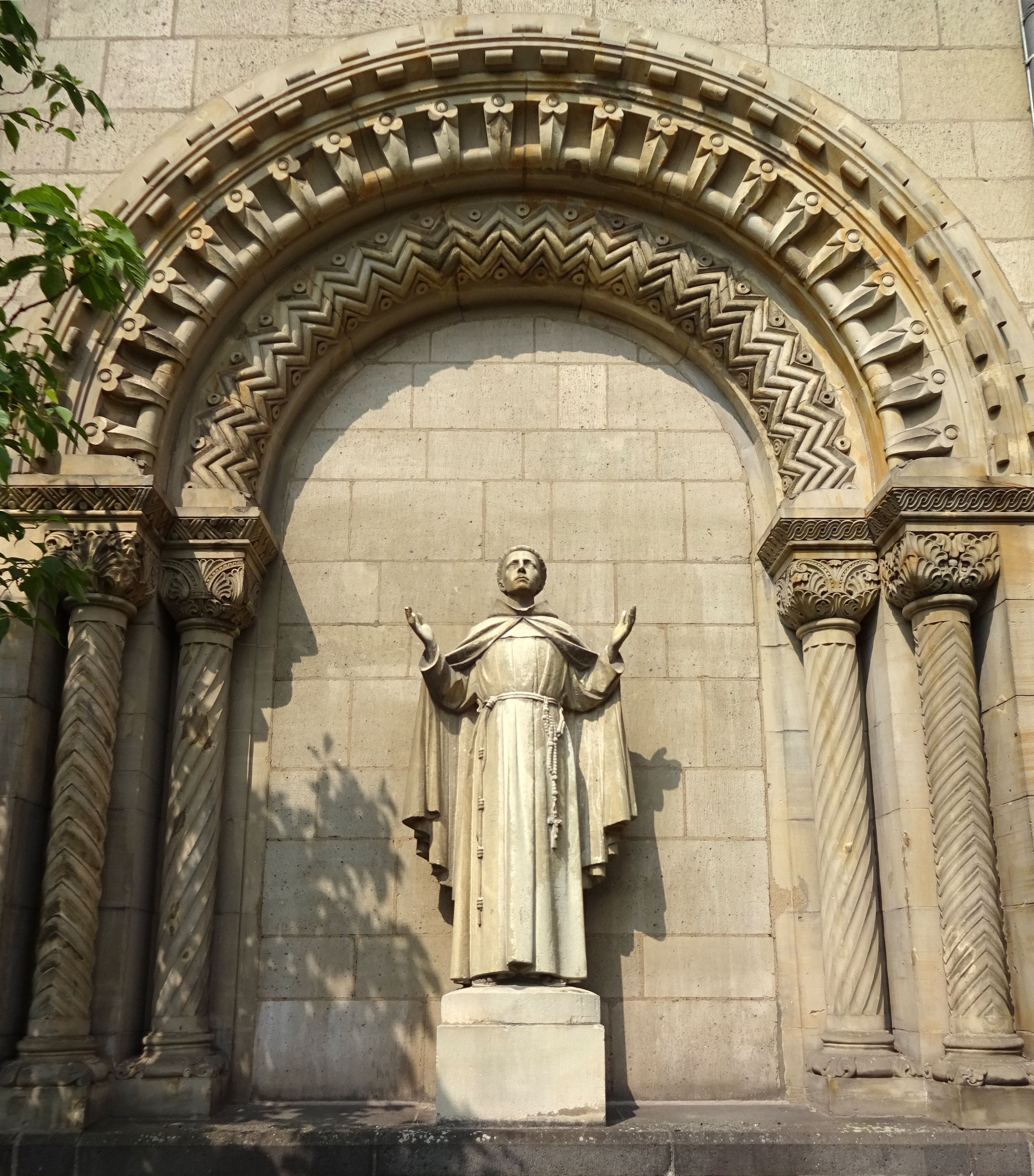 Skulptur des Antonius von Padua, St. Antonius Kirche, Adalbertstraße, Düsseldorf-Oberkassel